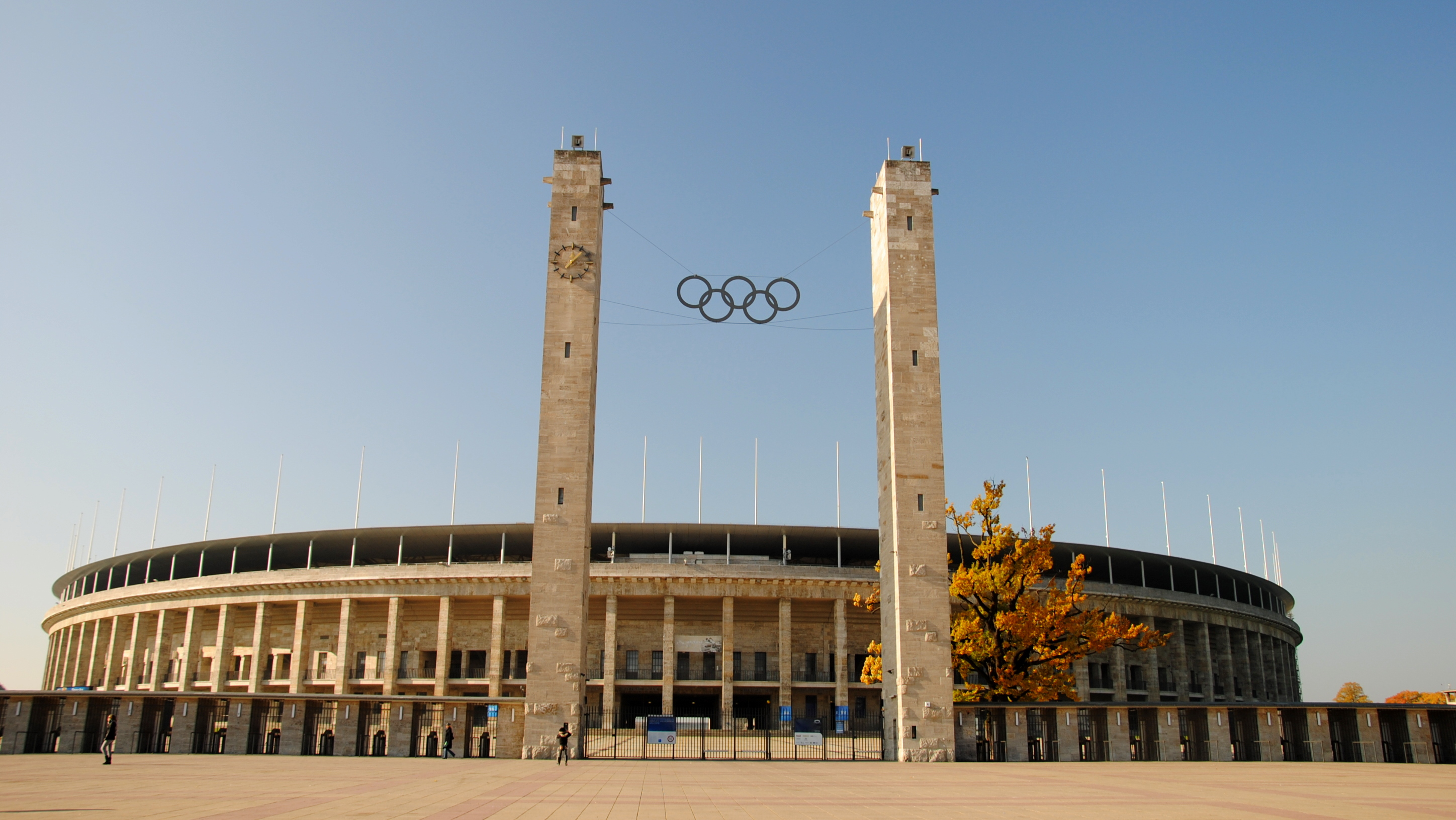 Berlim, Alemanha.